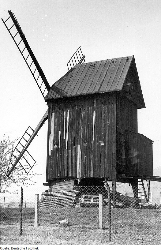 Original image description from the Deutsche Fotothek Doberlug-Kirchhain-Lichtena. Bockmühle